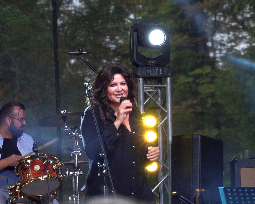 Vystoupení v Českém Těšíně, 6. září 2019